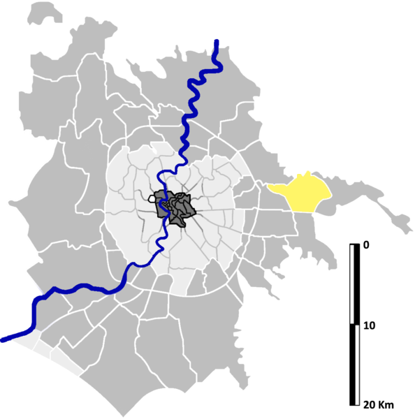 Lunghezza